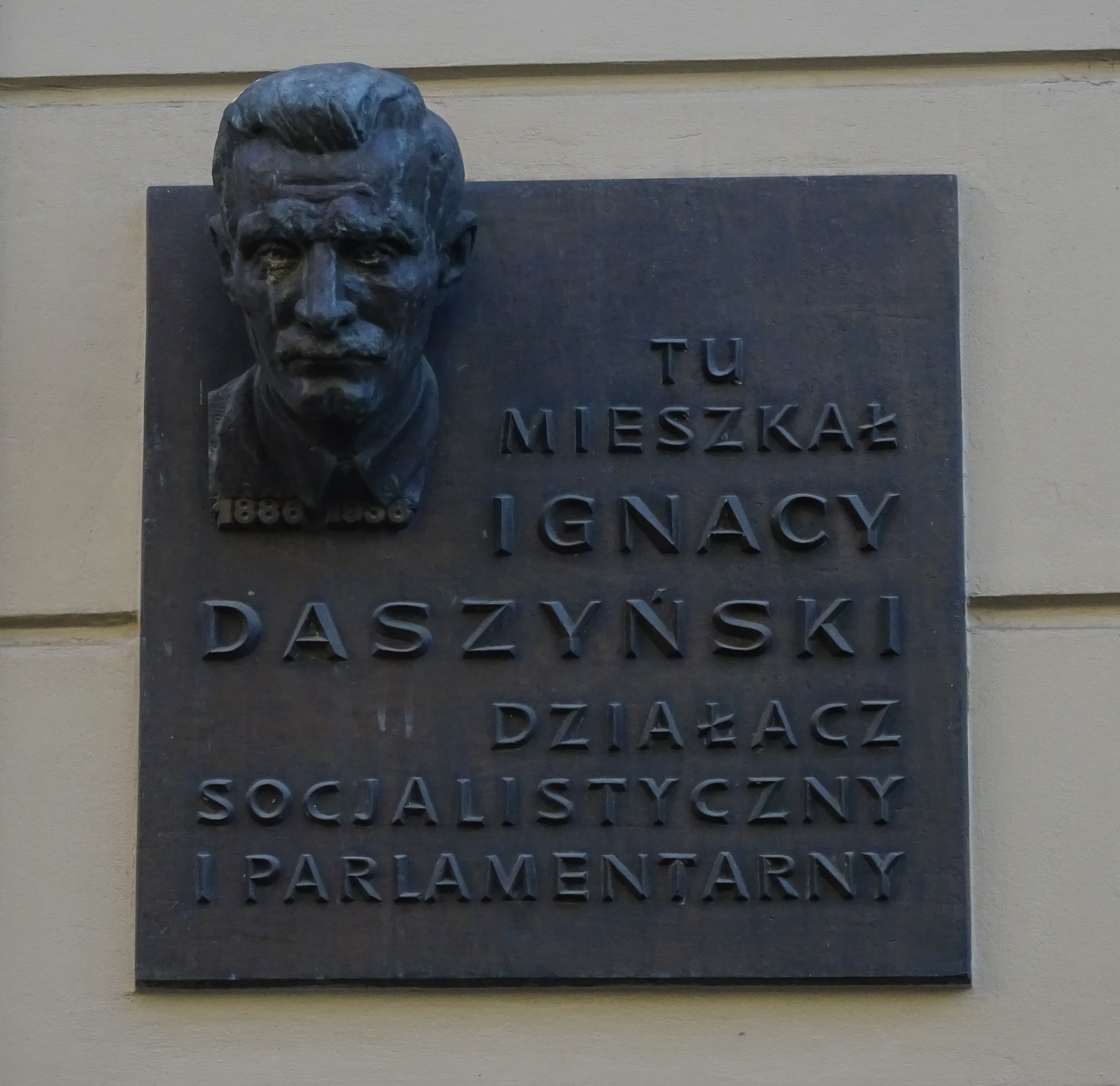 Ulica Kremerowska 6 - tablica upamiętniająca zamieszkiwanie owej kamienicy przez Ignacego Daszyńskiego. Kraków, 2018.